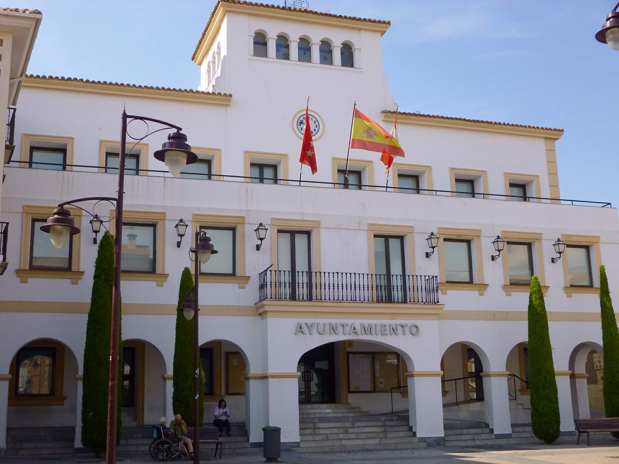 Ayuntamiento de San Sebastián de los Reyes